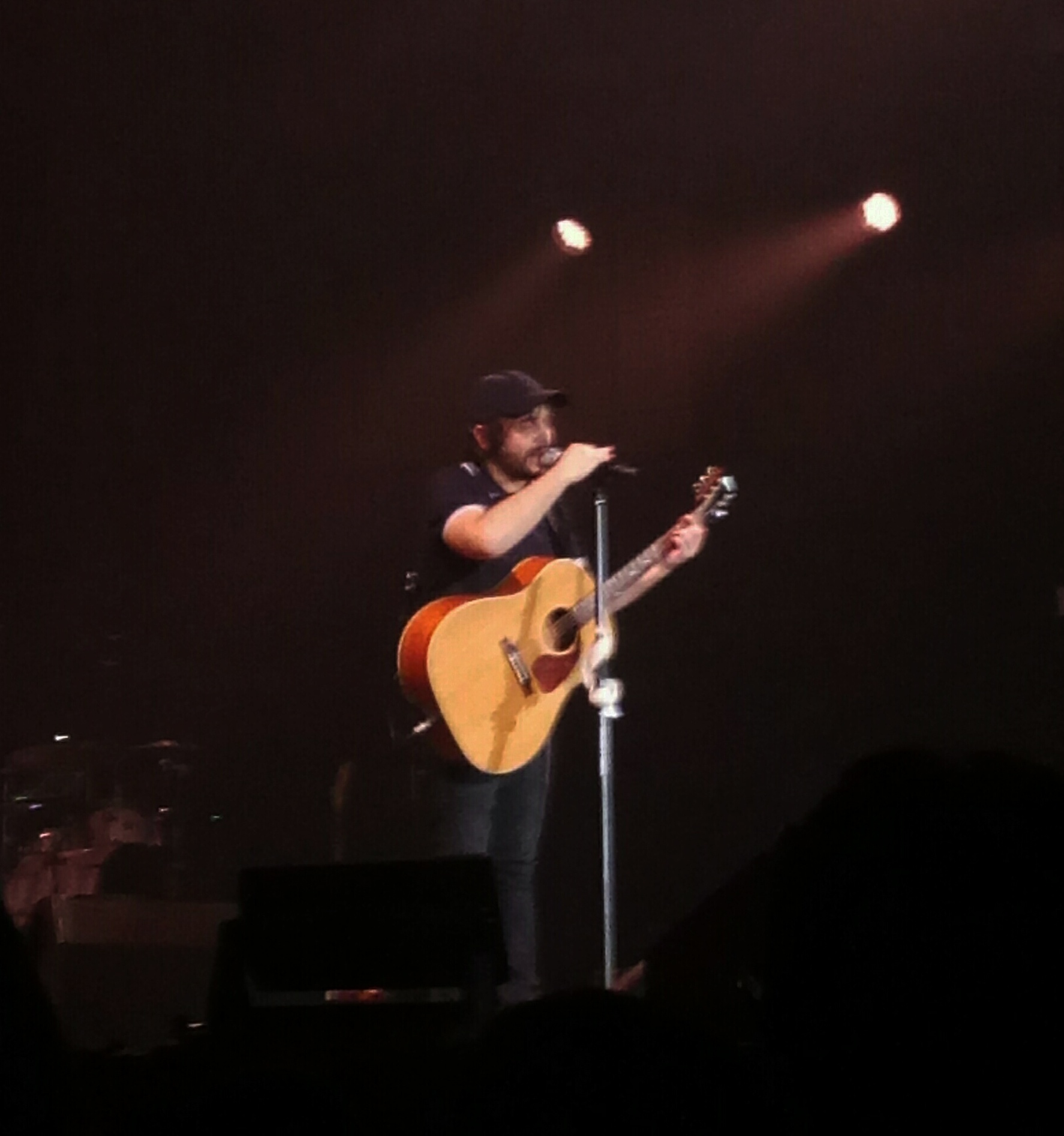 Il cantautore italiano Calcutta in concerto al PalaTupparello di Acireale il 9 febbraio 2019